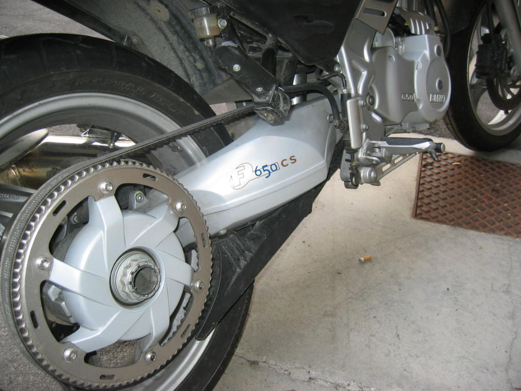 BMW F650CS belt drive